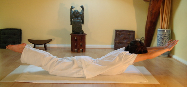 Yoga postures niralamba-shalabhasana